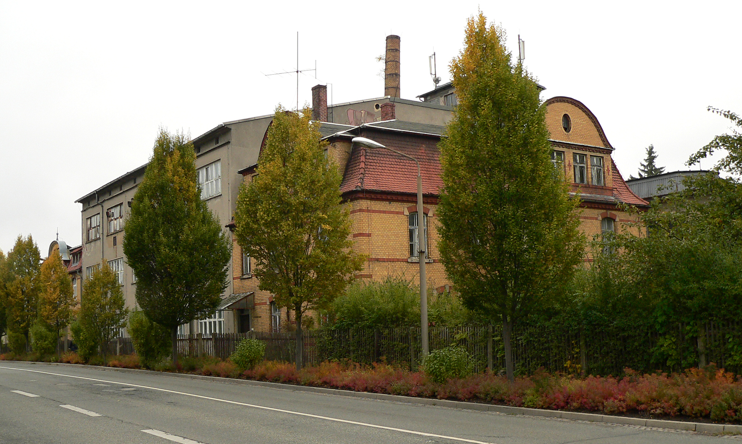 Straßenfront von Loeser & Richter